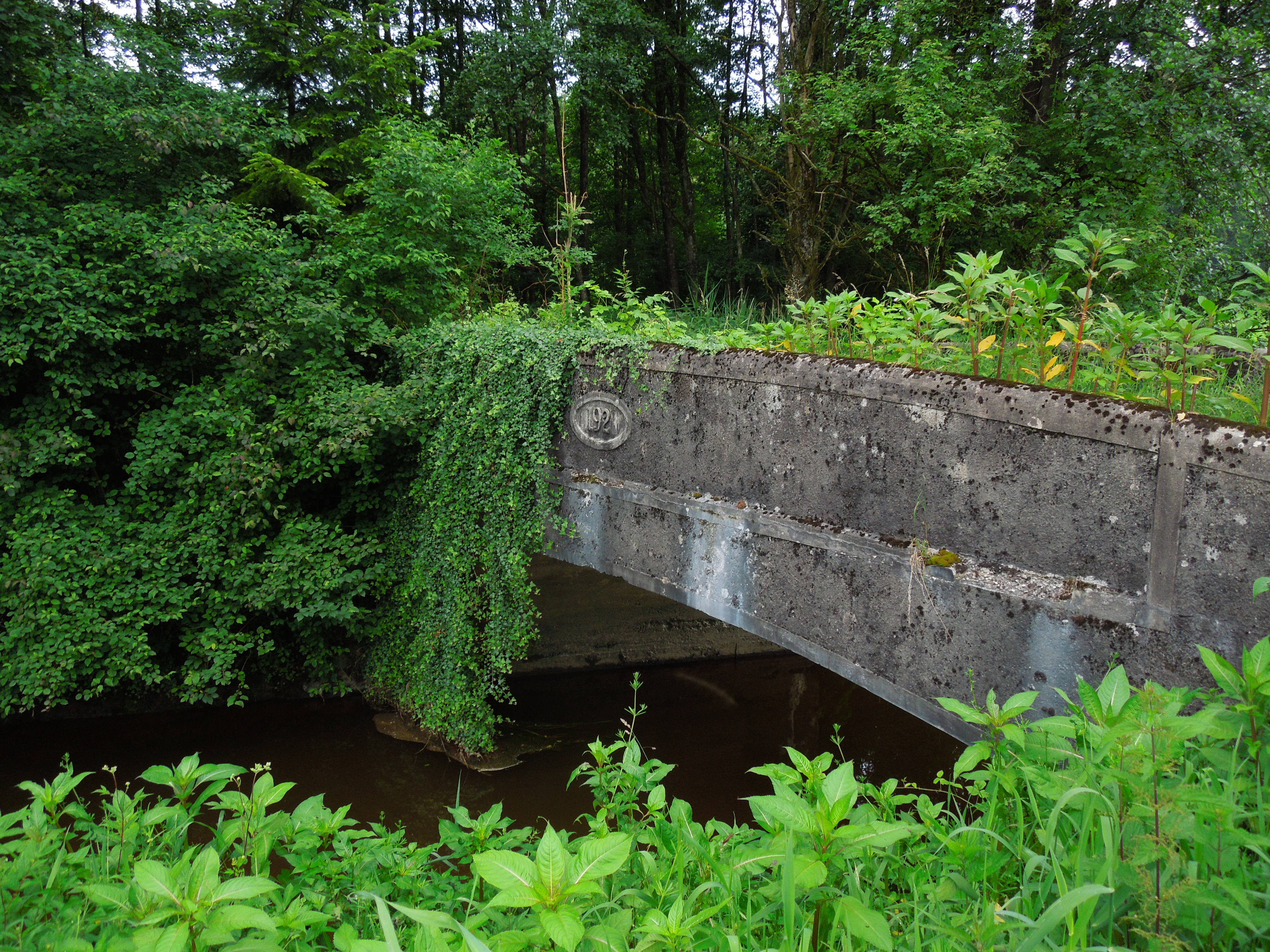 Brücke von 1921 über den Fluss Murn bei Locking, Amerang